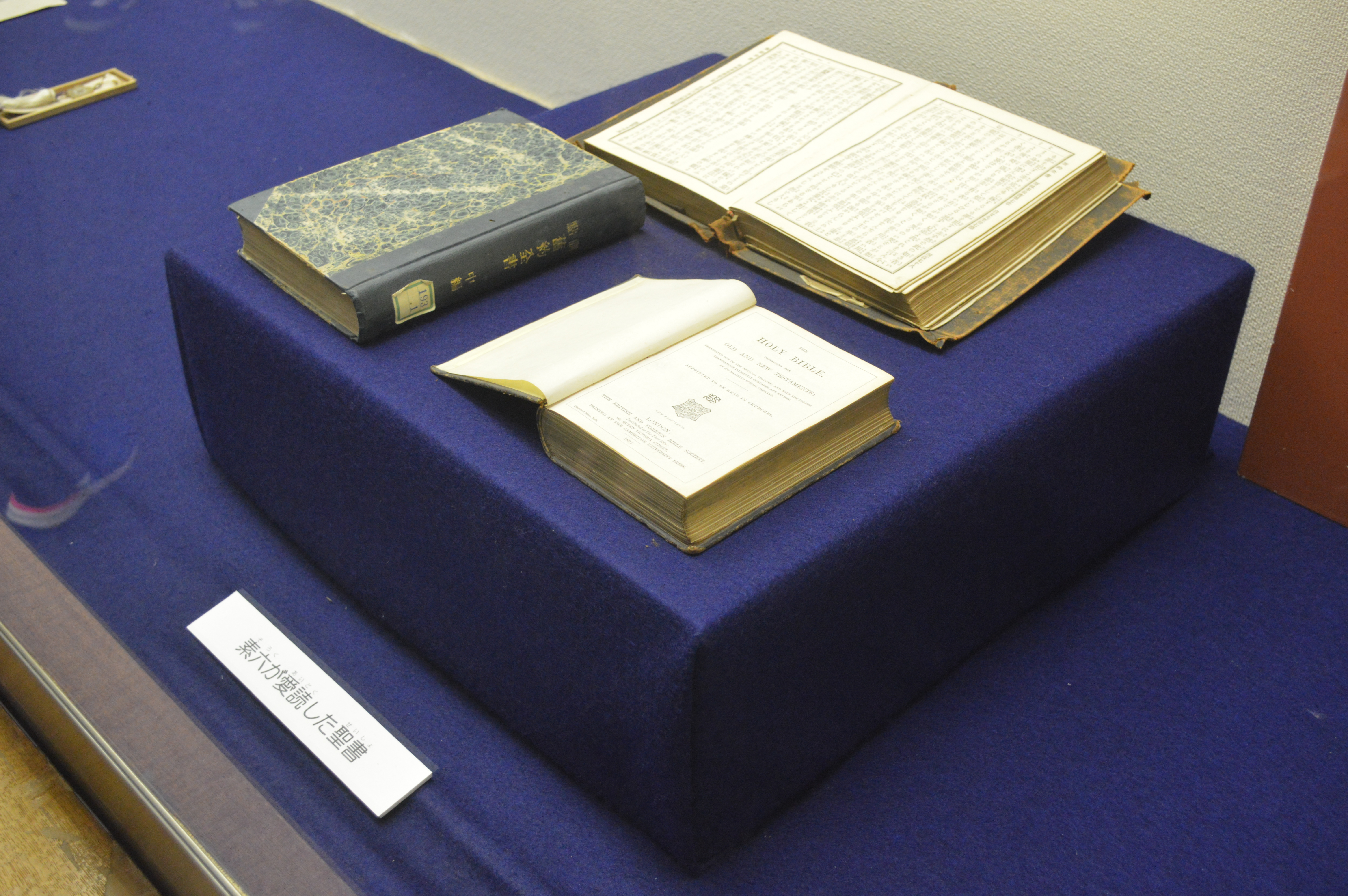 静岡県沼津市にある沼津市明治史料館。キリスト者である江原素六が使用していた聖書。